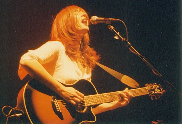 Cristina Donà in concerto al Palladium di Roma, 19 febbraio 2001